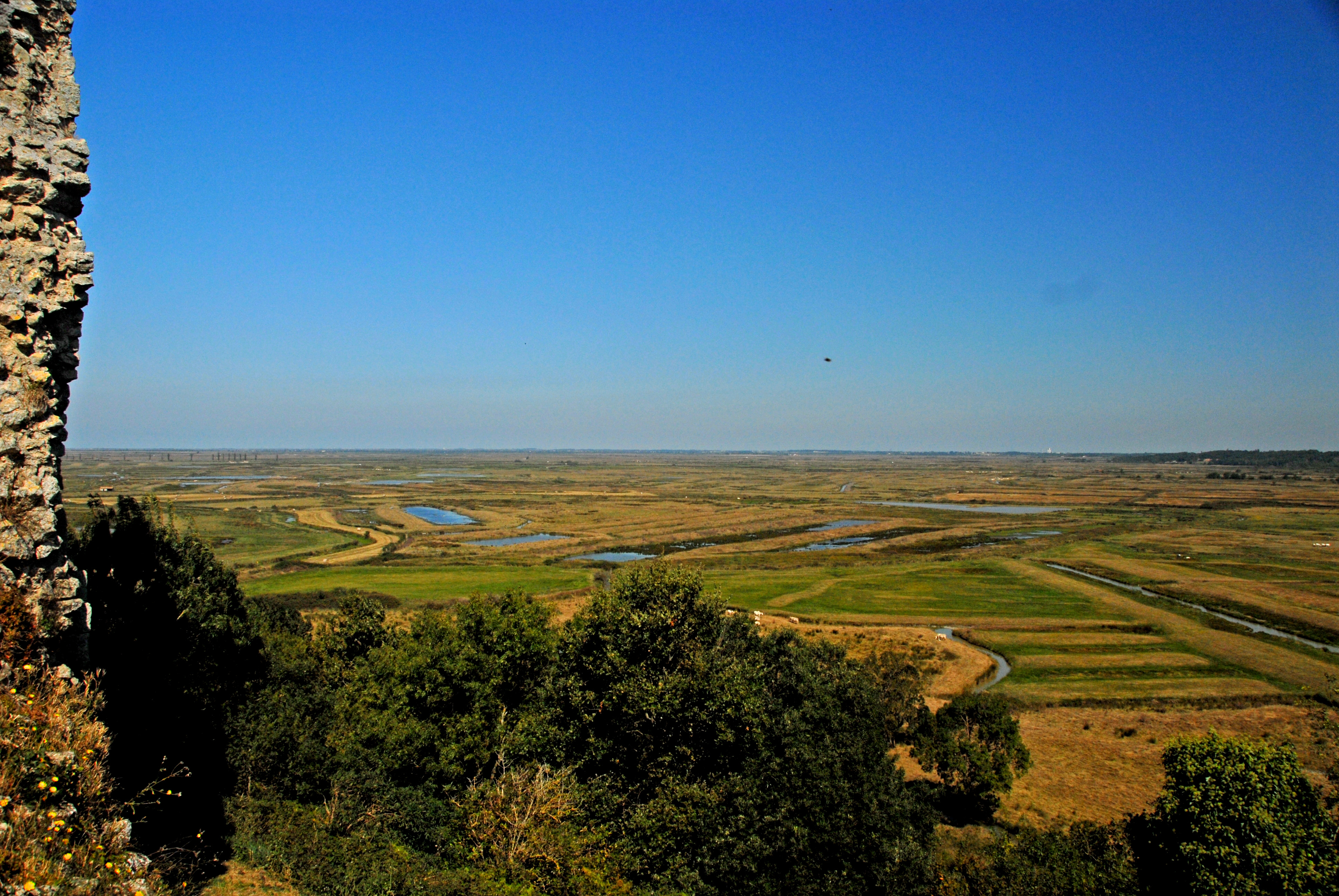 Tour-de-Broe, Marais de Brouage